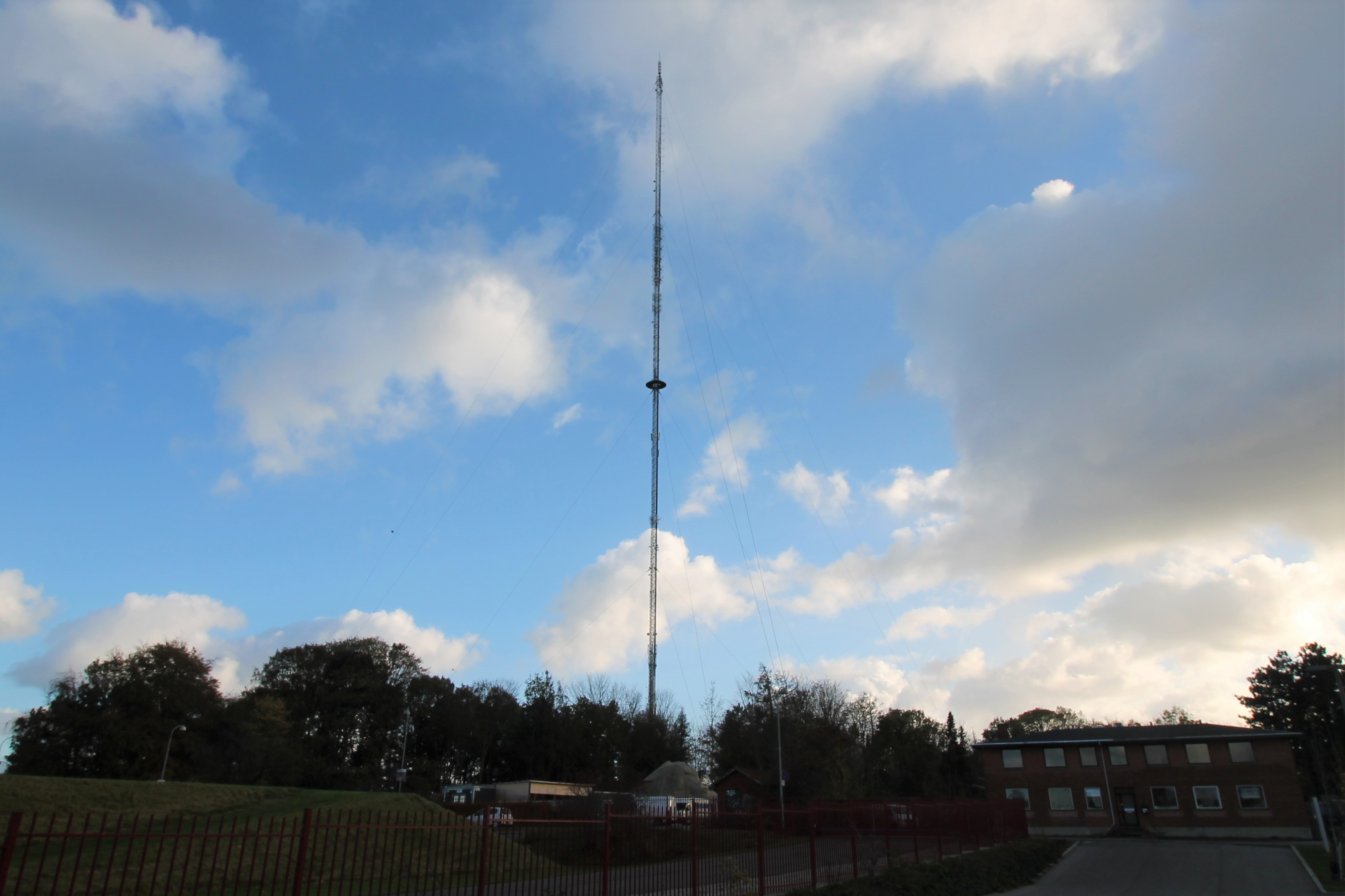 Gladsaxesenderen